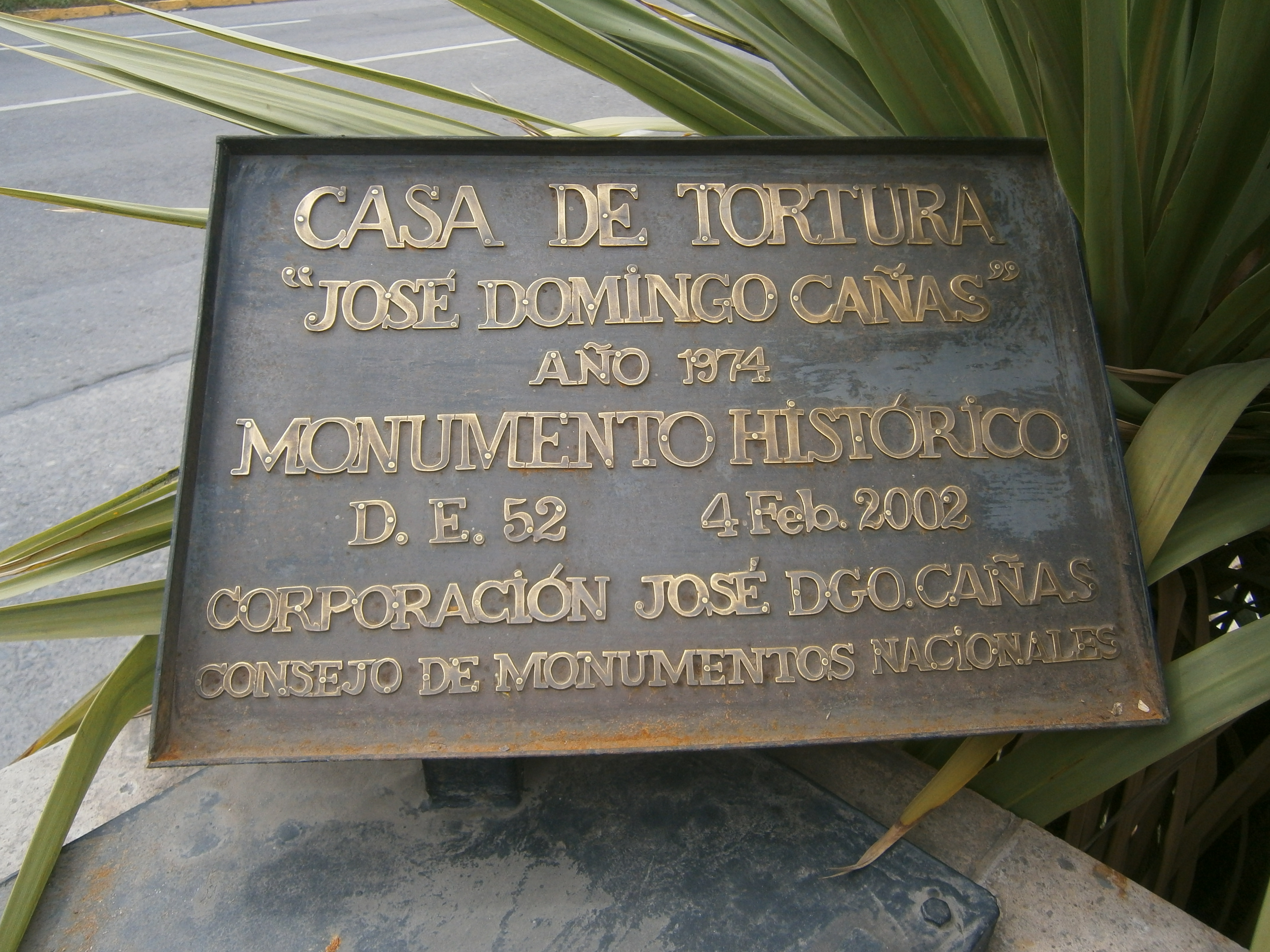 Sitio histórico ubicado en Av. José Domingo Cañas Nº 1367 This is a photo of a national monument in Chile: 481